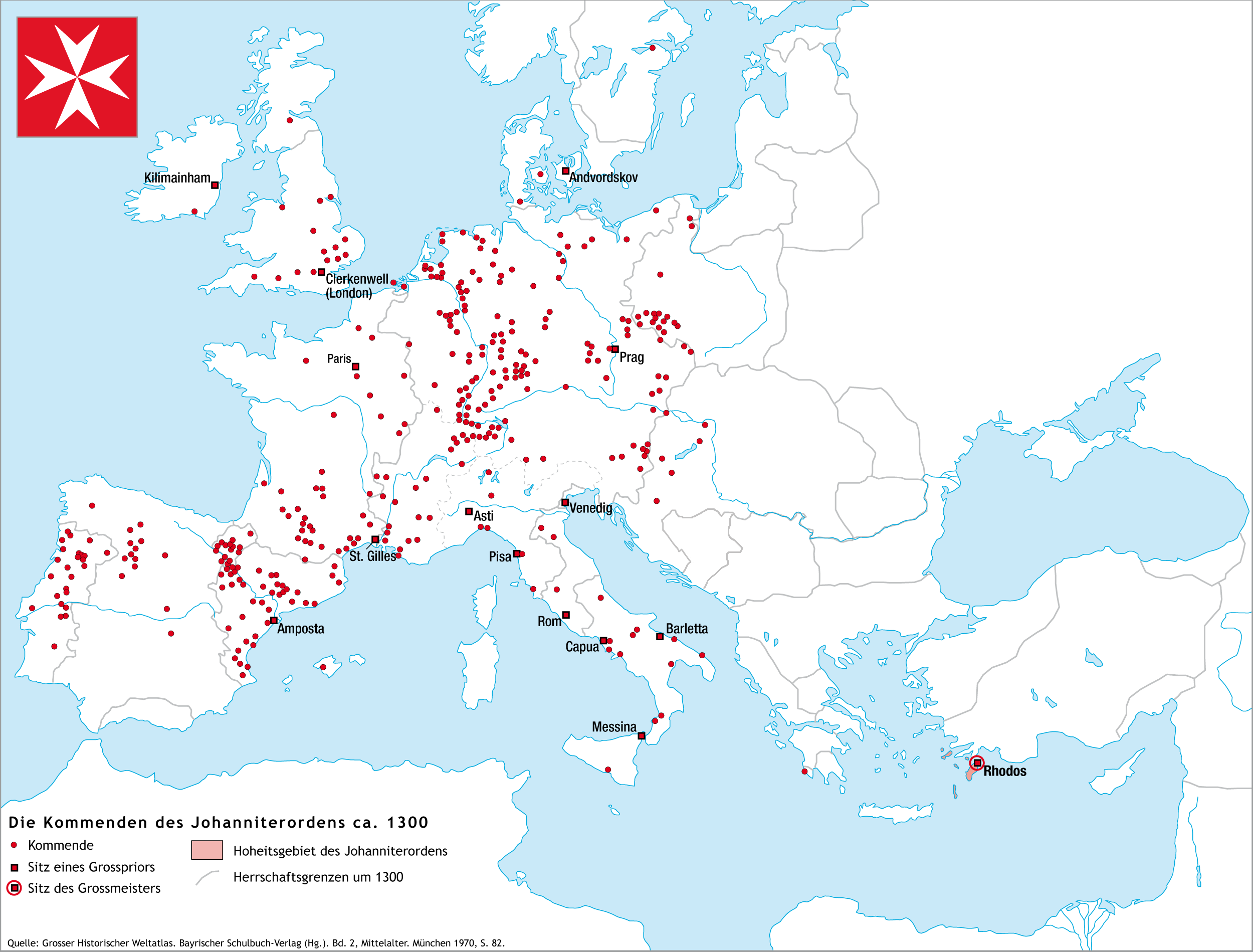 Die Niederlassungen des Johanniterordens in Europa um 1300. Karte aus der Saisonausstellung 2008 im Ritterhaus Bubikon, Schweiz ("Die Kreuzzüge eine Spurensuche: Die Ritterorden in der Schweiz").